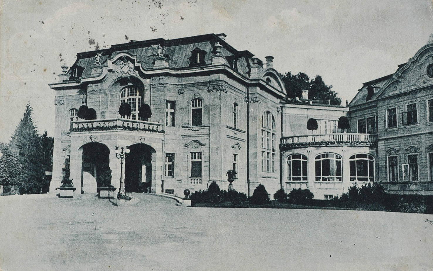 Палац потоцьких від головного входу. Поштівка. Накладом В. Кжишковського.